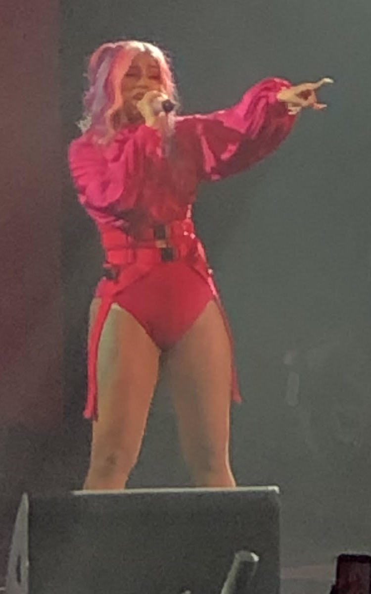 cardi b